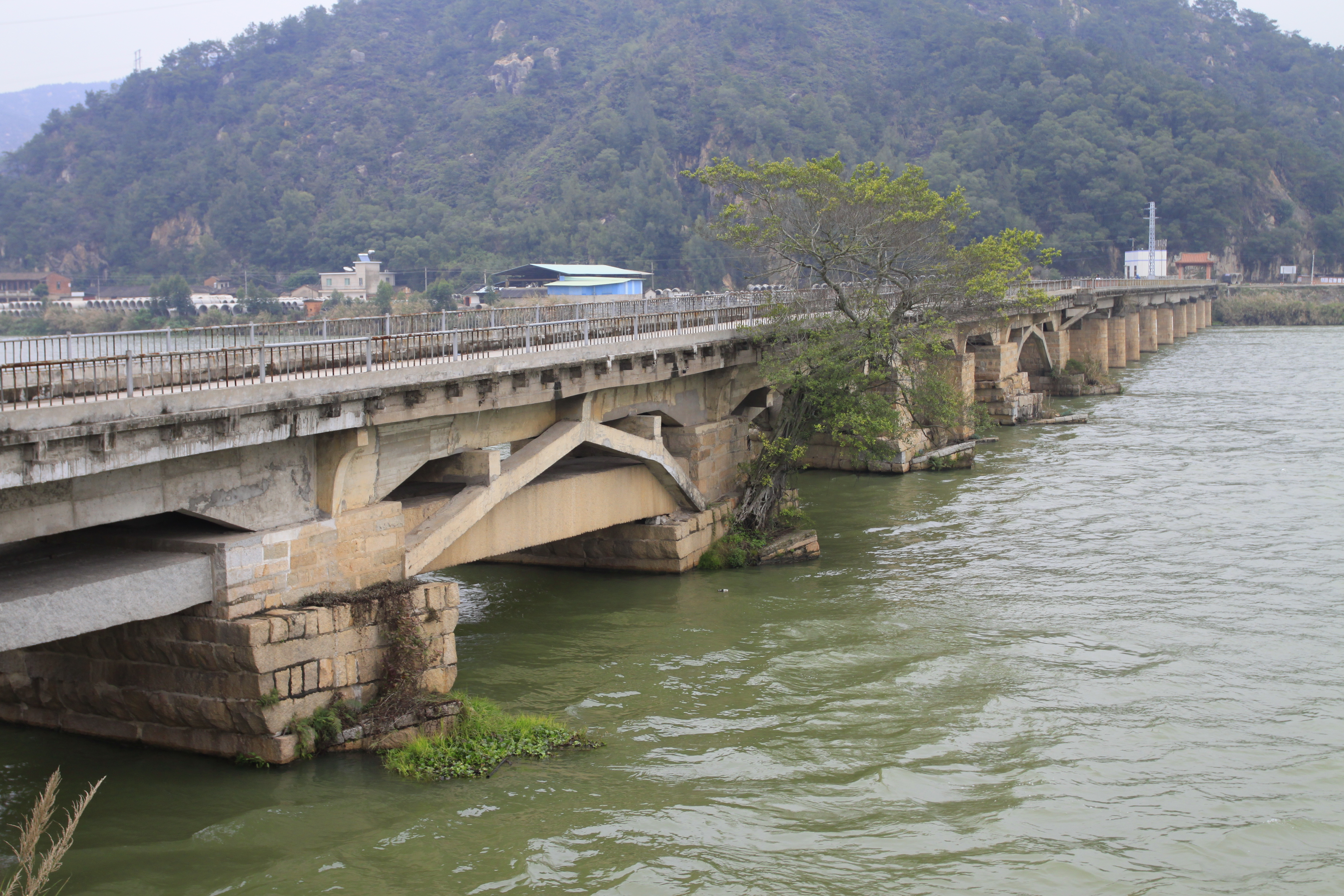 江东桥，位于中国福建省漳州市，是全国重点文物保护单位。